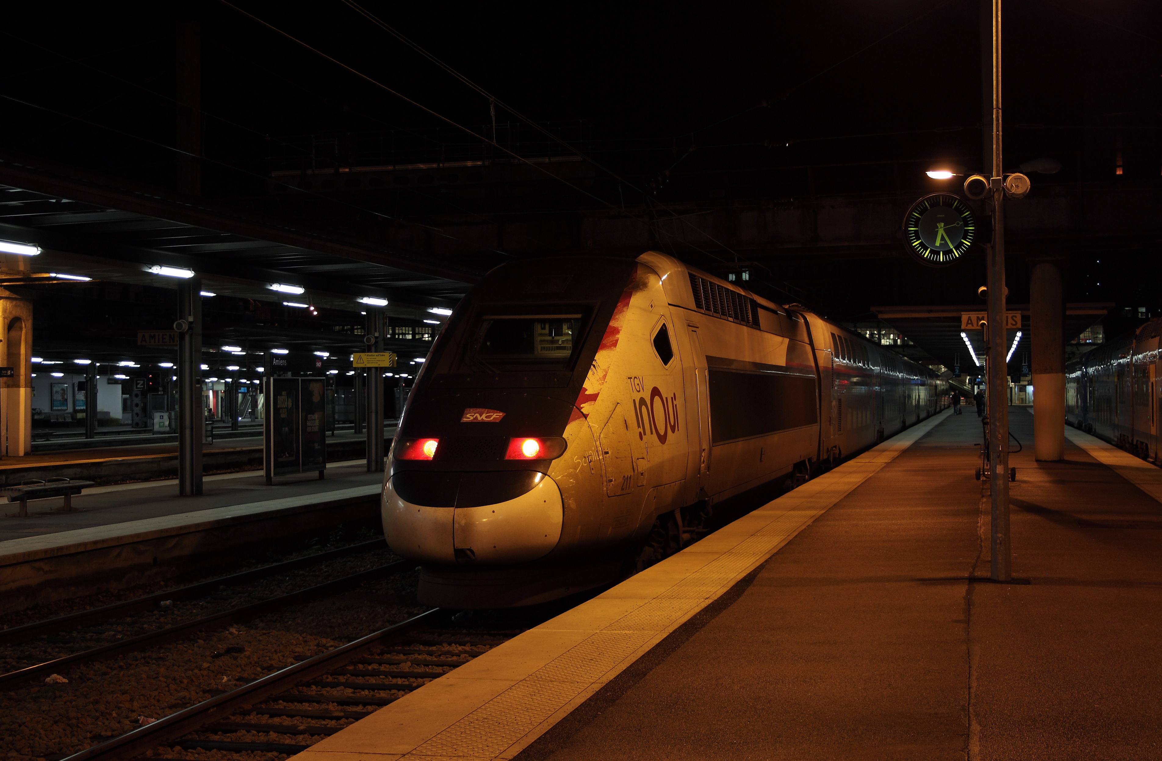 Cette rame TGV Duplex assure le TERGV n° 844551 (Amiens – Arras – Lille-Europe – Dunkerque).